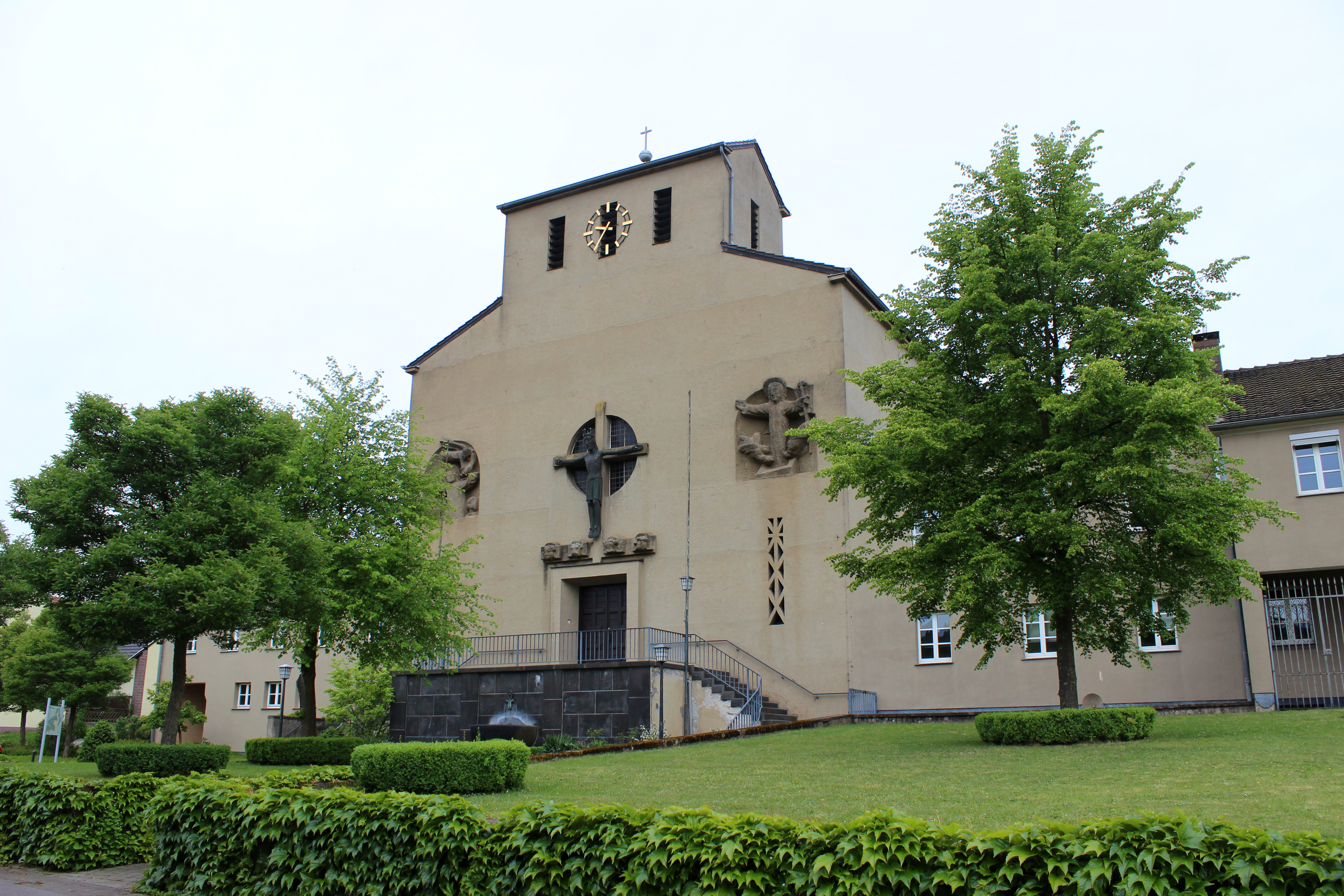 Die katholische Pfarrkirche St. Agatha in Merchingen, einem Stadtteil von Merzig, Landkreis Merzig-Wadern, Saarland.